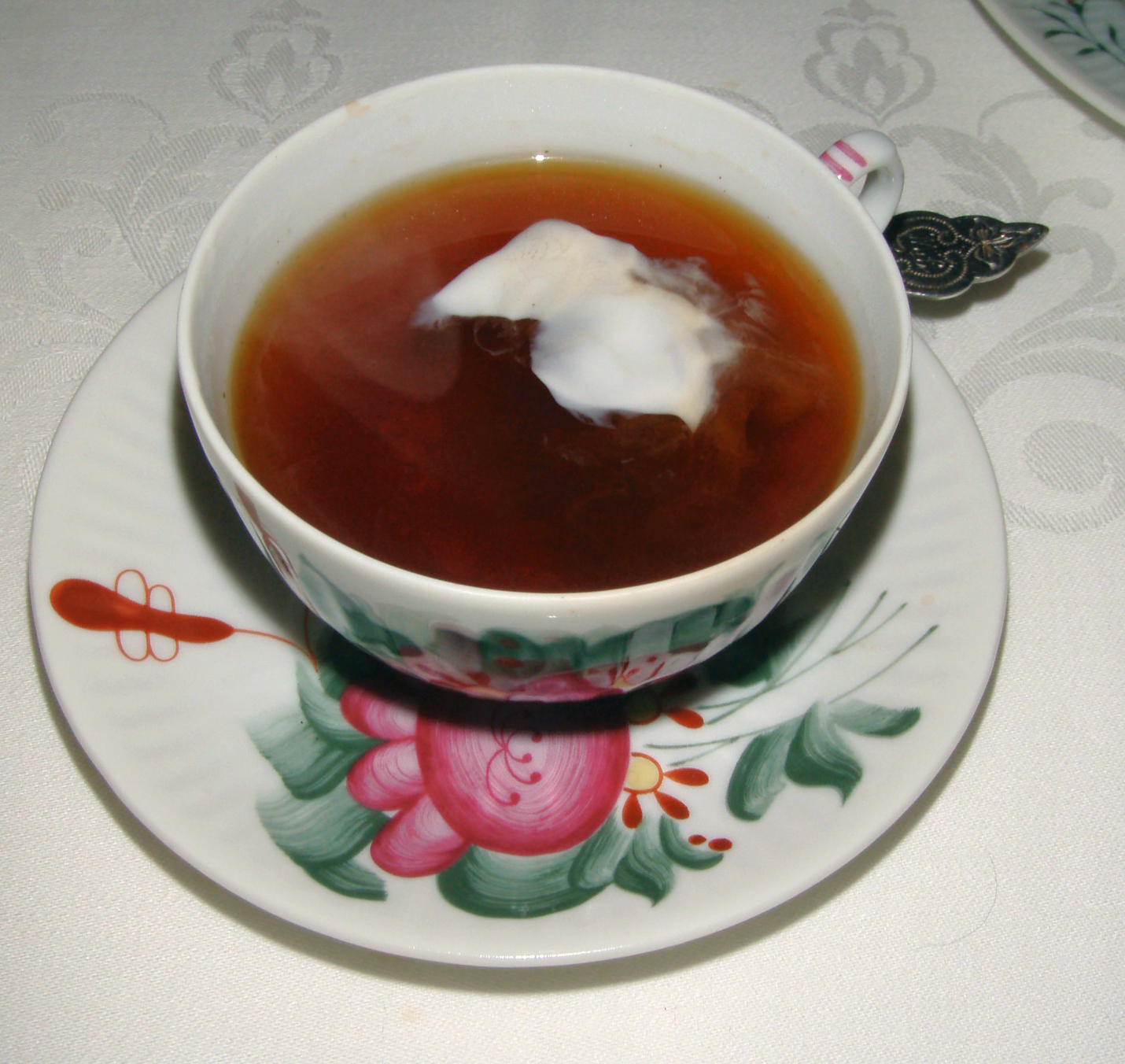 Tee mit Sahnewolke, die ostfriesische Art Tee zu trinken. Aufgenommen in Emden, Niedersachsen am 25.12.2008.